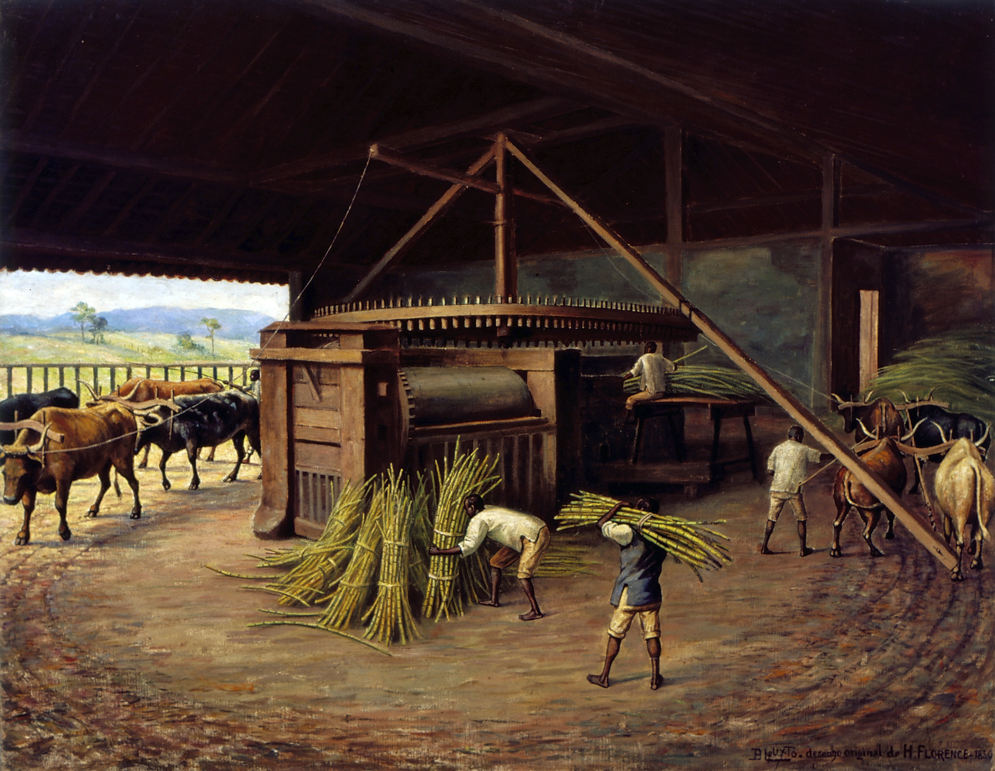 Obra que integra o acervo do Museu Paulista da USP. Coleção Benedito Calixto de Jesus - CBCJ